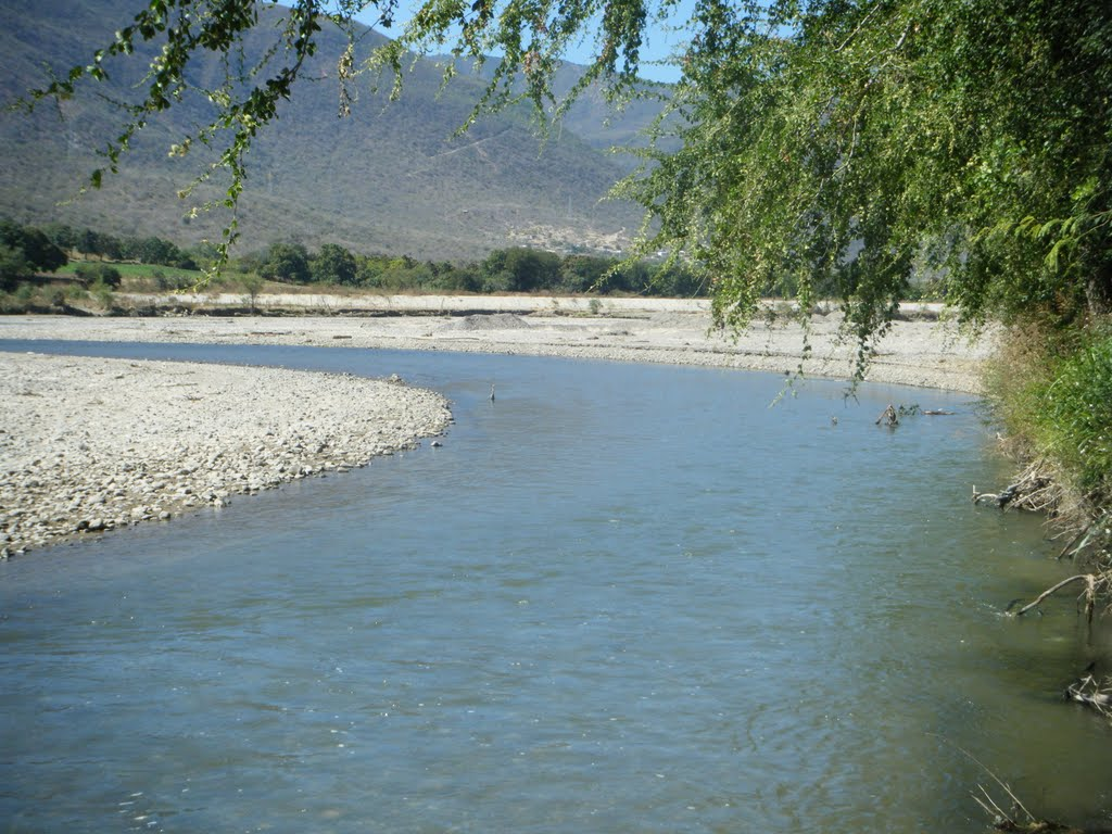 El Rio Tlapaneco